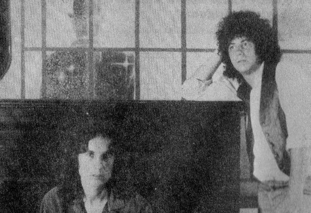 Moro-Satragni